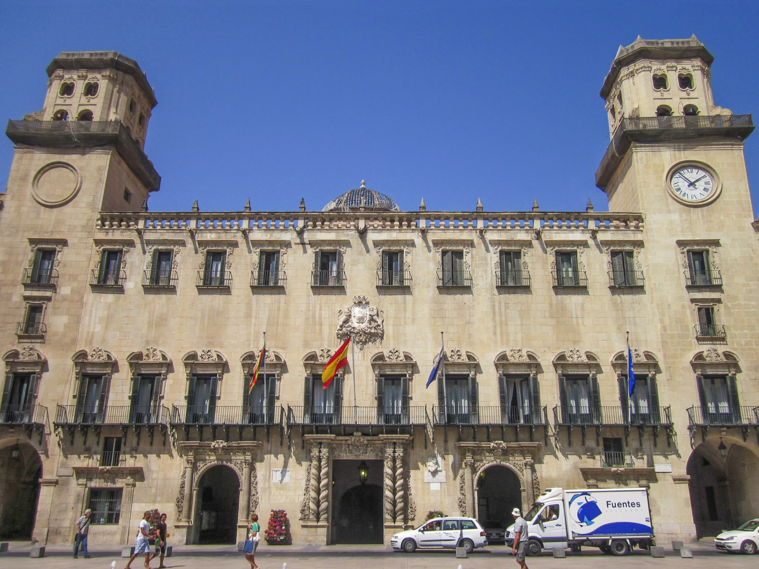 Stadhuis van Alicante, Spanje